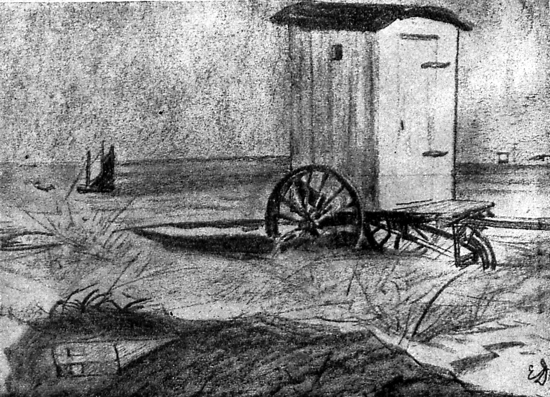 Erich Dummer: Timmerdorfer Strand. Zeichnung.. (Studie zu einem Gemälde im Behnhause.)